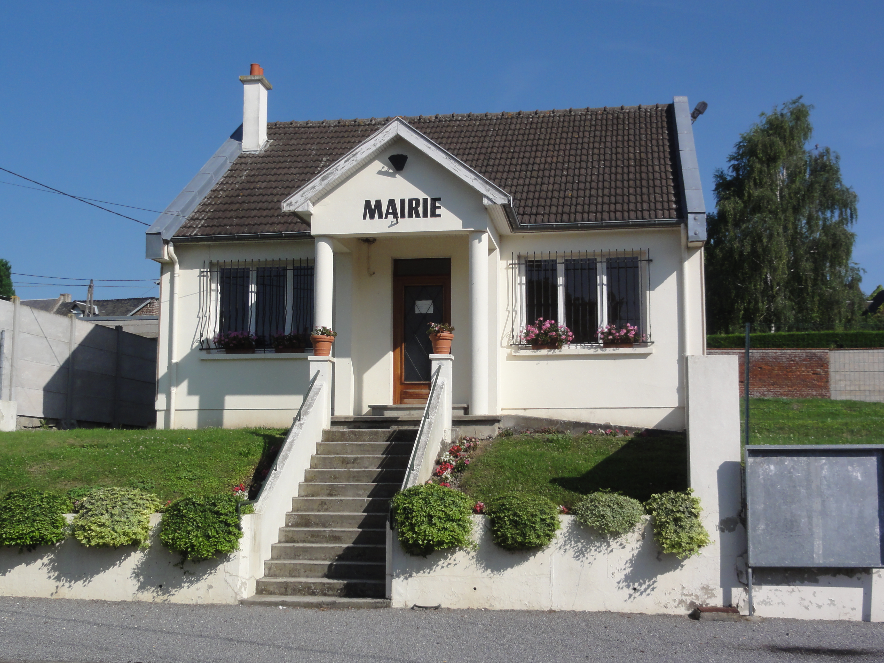 Châtillon-sur-Oise (Aisne) mairie